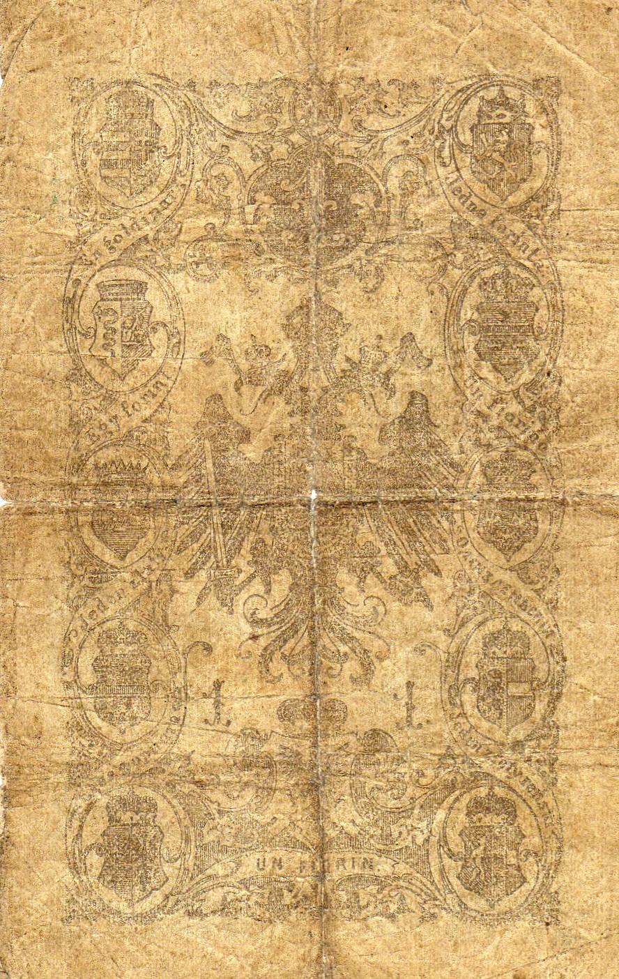 Jeden zlatník, emise 1. VI. 1868